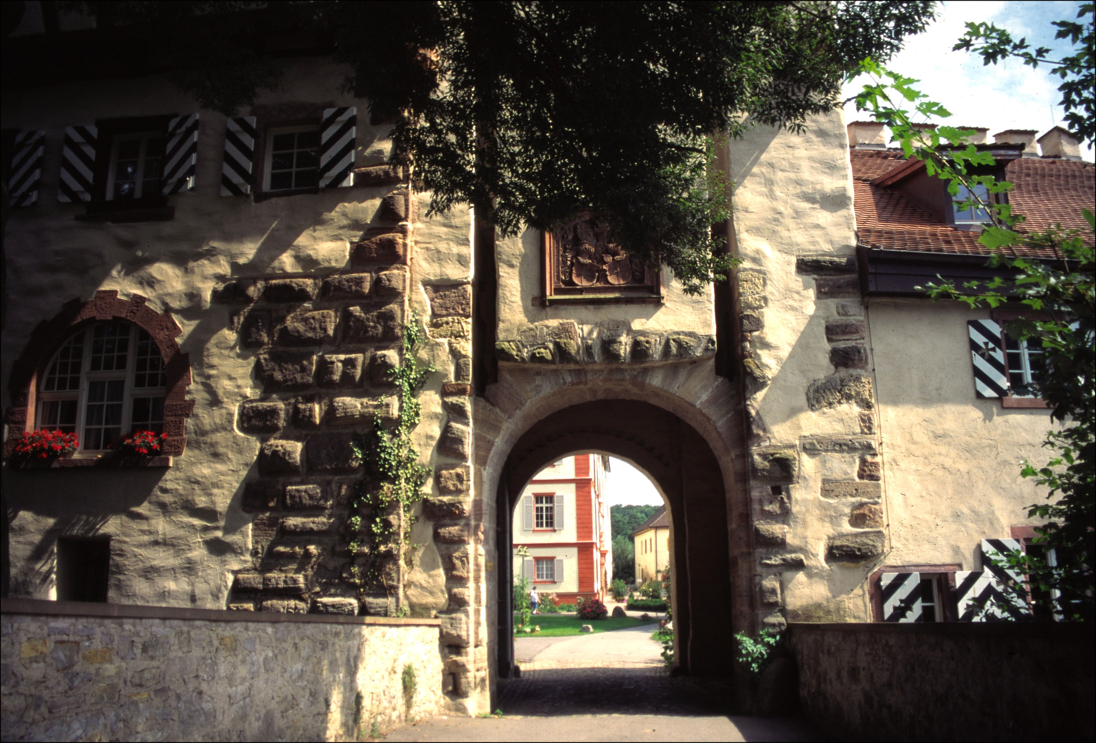 Schloss Beuggen - Tor-Aussenseite